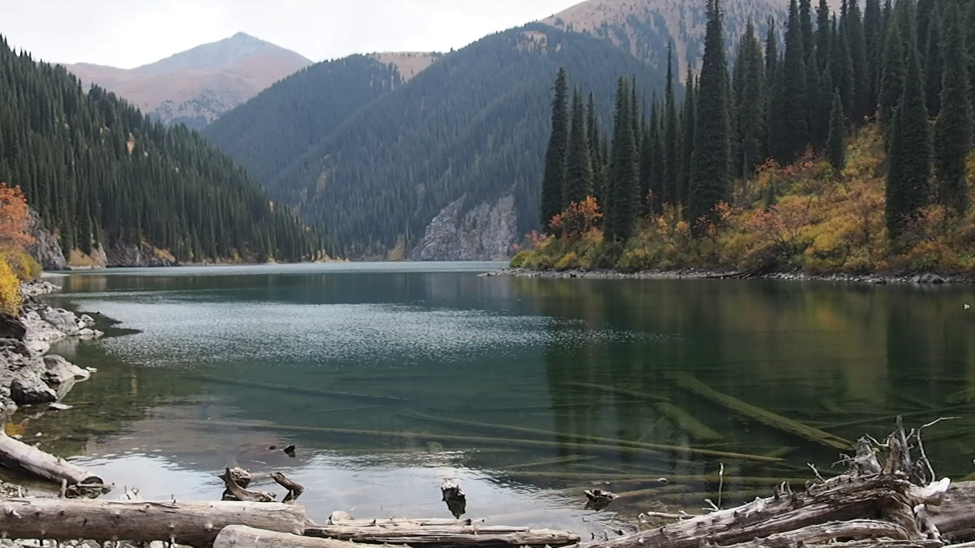 Der zweite (mittlere) Kolsai-See in Kasachstan